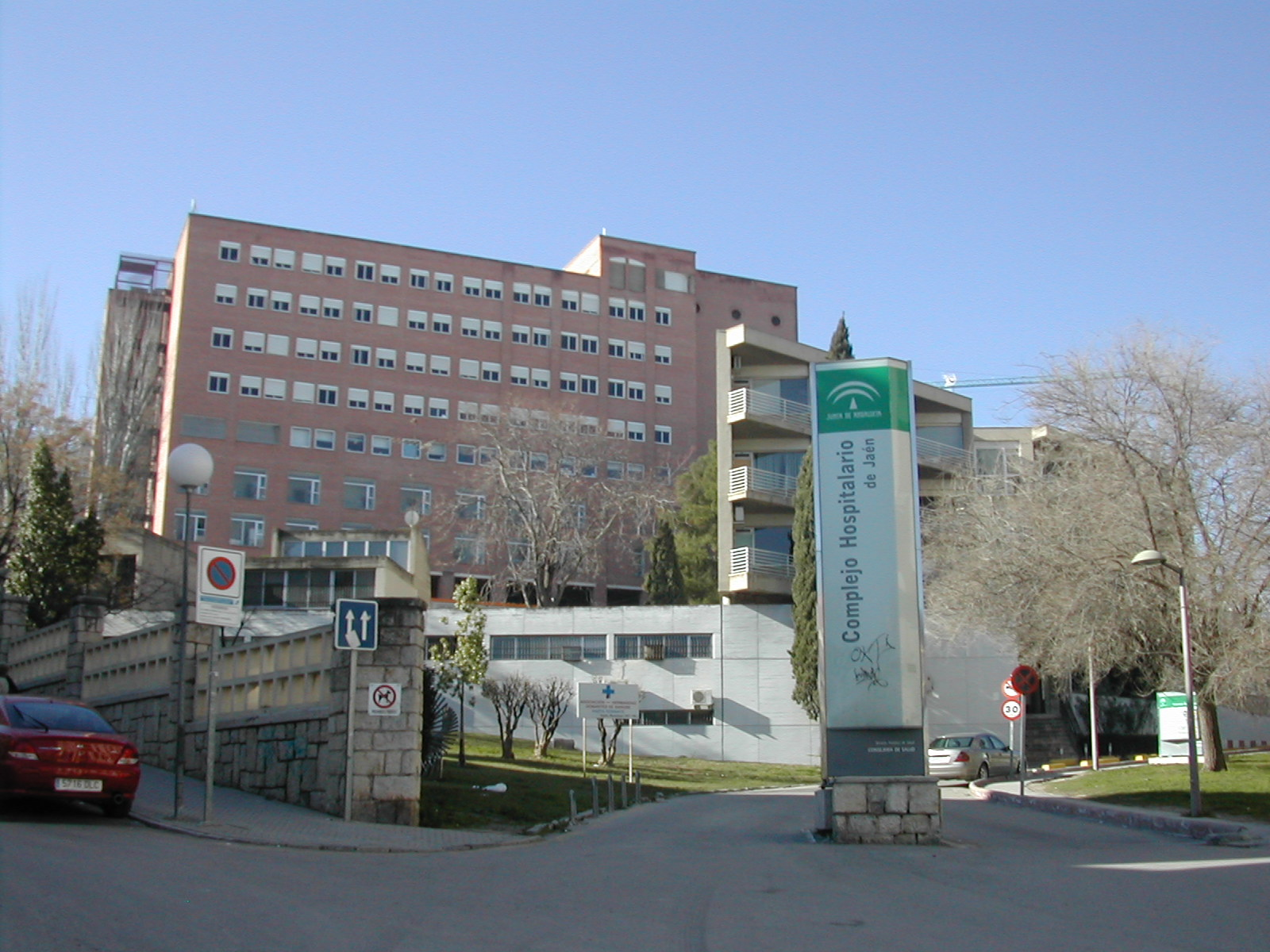 Complejo Hospitalario de Jaén.